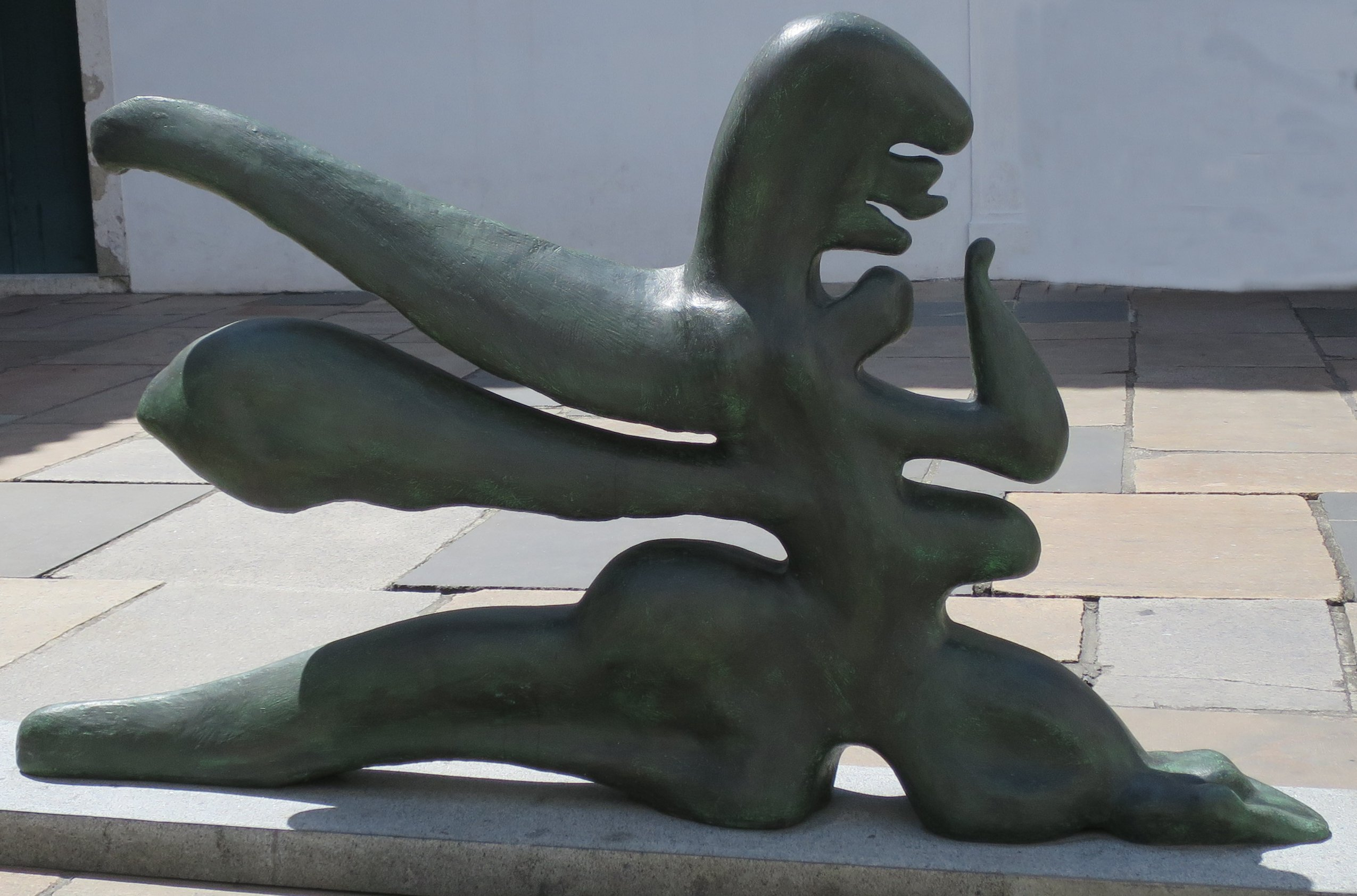 Maria Martins – O implacável (The Implacable), 1944, bronze, 238 cm, Paҫo Imperial, Rio de Janeiro